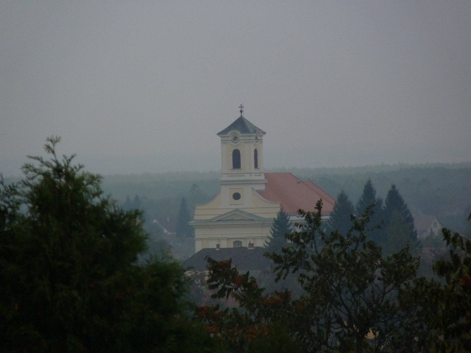 Szent Máté evangélista római katolikus templom (Kóka, Kossuth u.) This is a photo of a monument in Hungary, Identifier: 7106